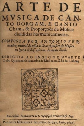 Arte de Musica de Canto Dorgam, e Canto Cham, & Proporçoens de Musica divididas harmonicamente (Lisboa: Pedro Craesbeeck) de António Fernandes e publicada em 1626.